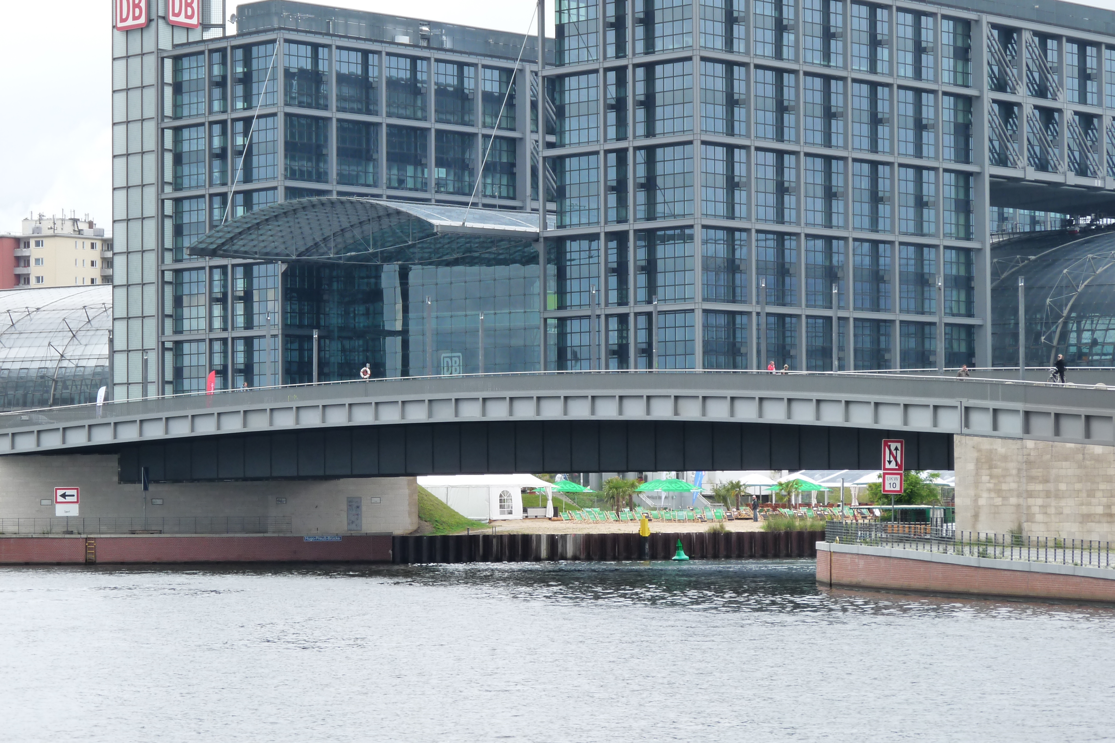 Hugo- Preuß-Brücke in Berlin an der Einfahrt zum Berlin-Spandauer-Schifffahrtskanal